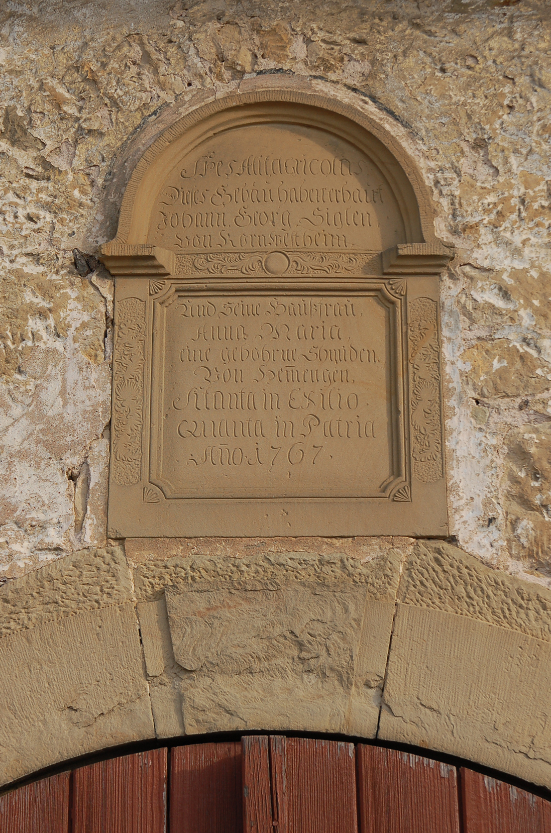 Stein mit Datierung (1767) und Erbauern (Johann Georg Sigle + Anna Maria Schmid) an einem Gebäude in Pulverdingen, Hauptstraße